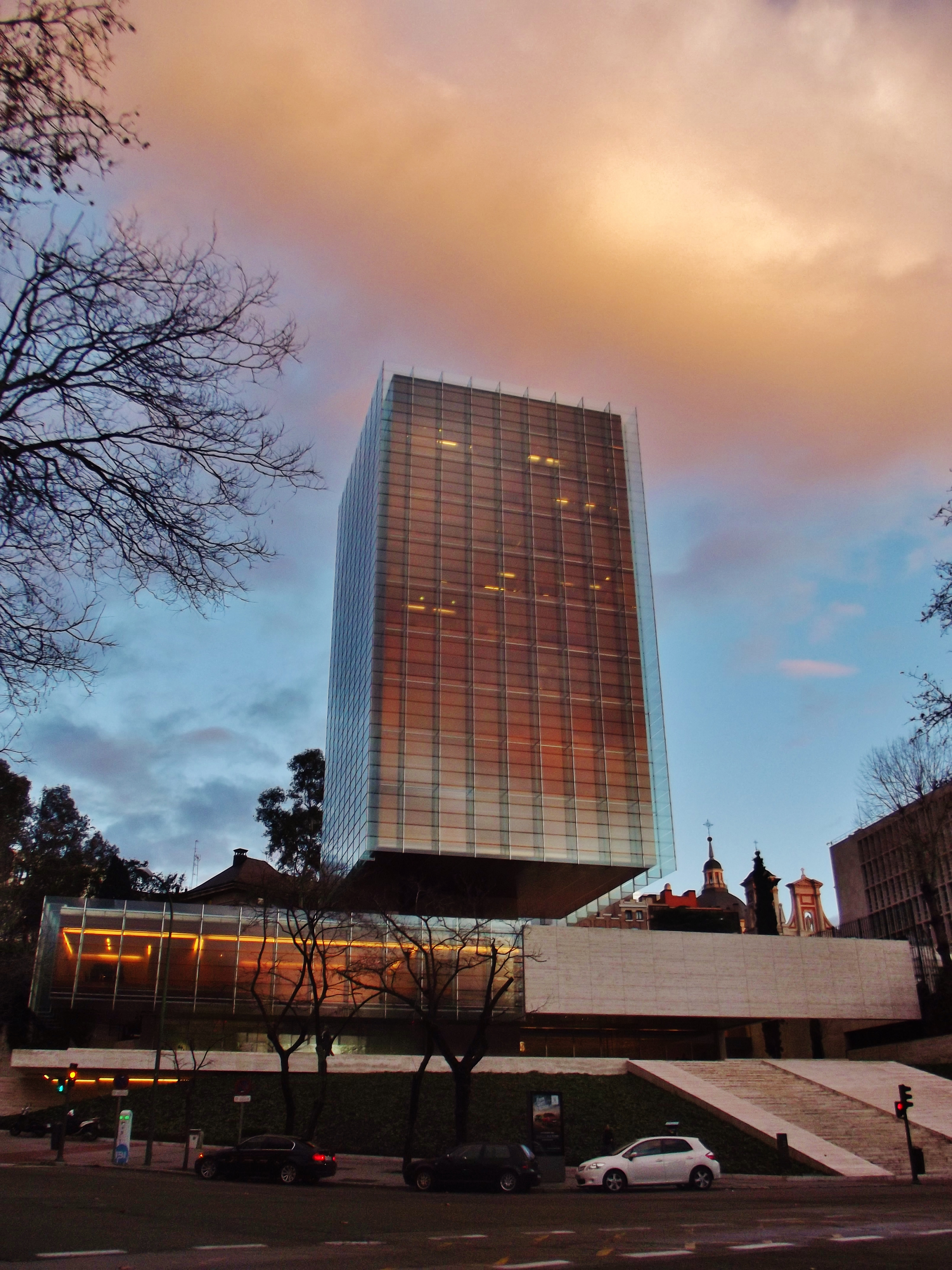 Edificio Castelar